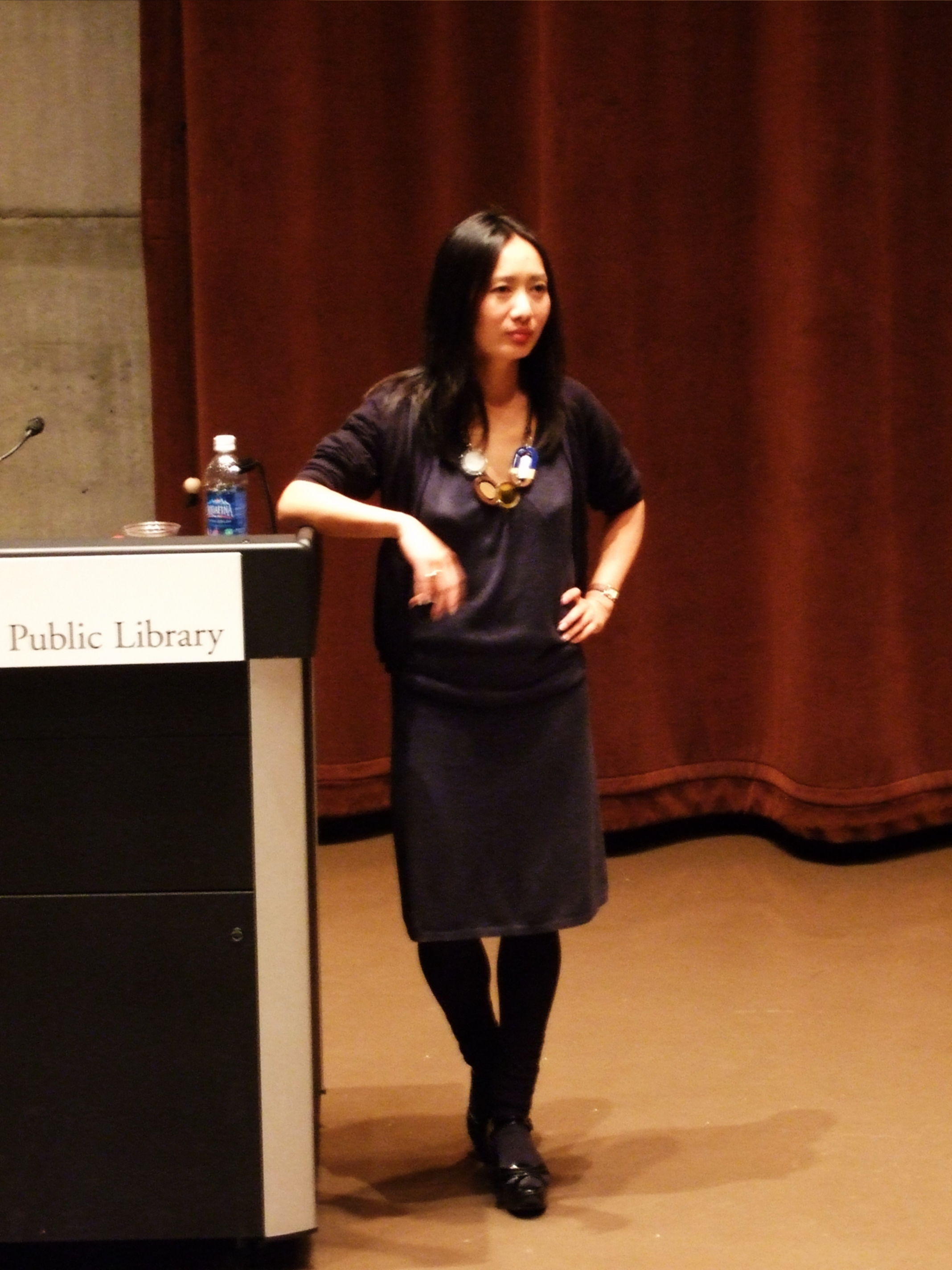 Diane Wei Liang